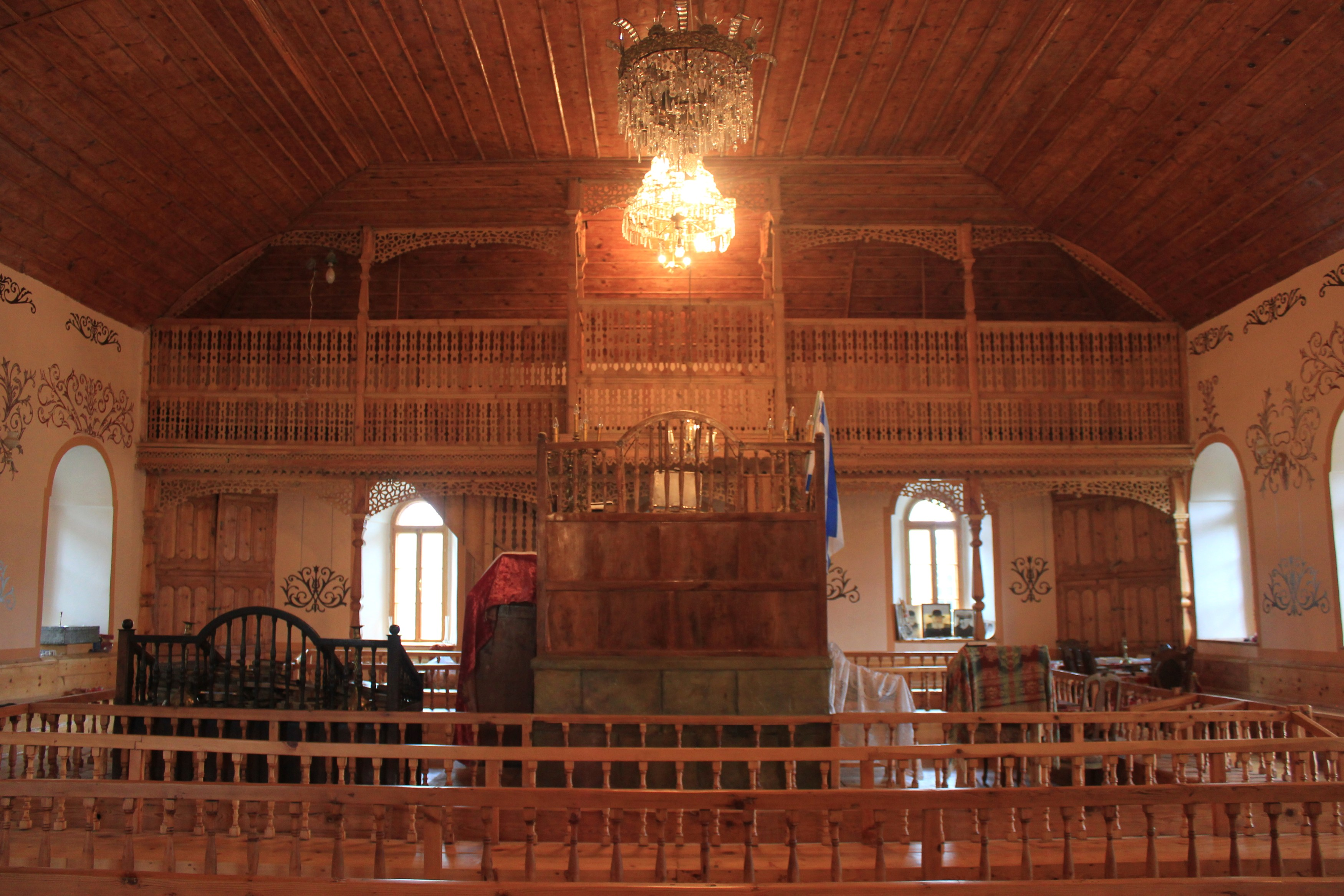 Die Alte Synagoge in Achalziche, Georgien. Hornjoserbsce: Stara synagoga w Achalciche, Georgiska.